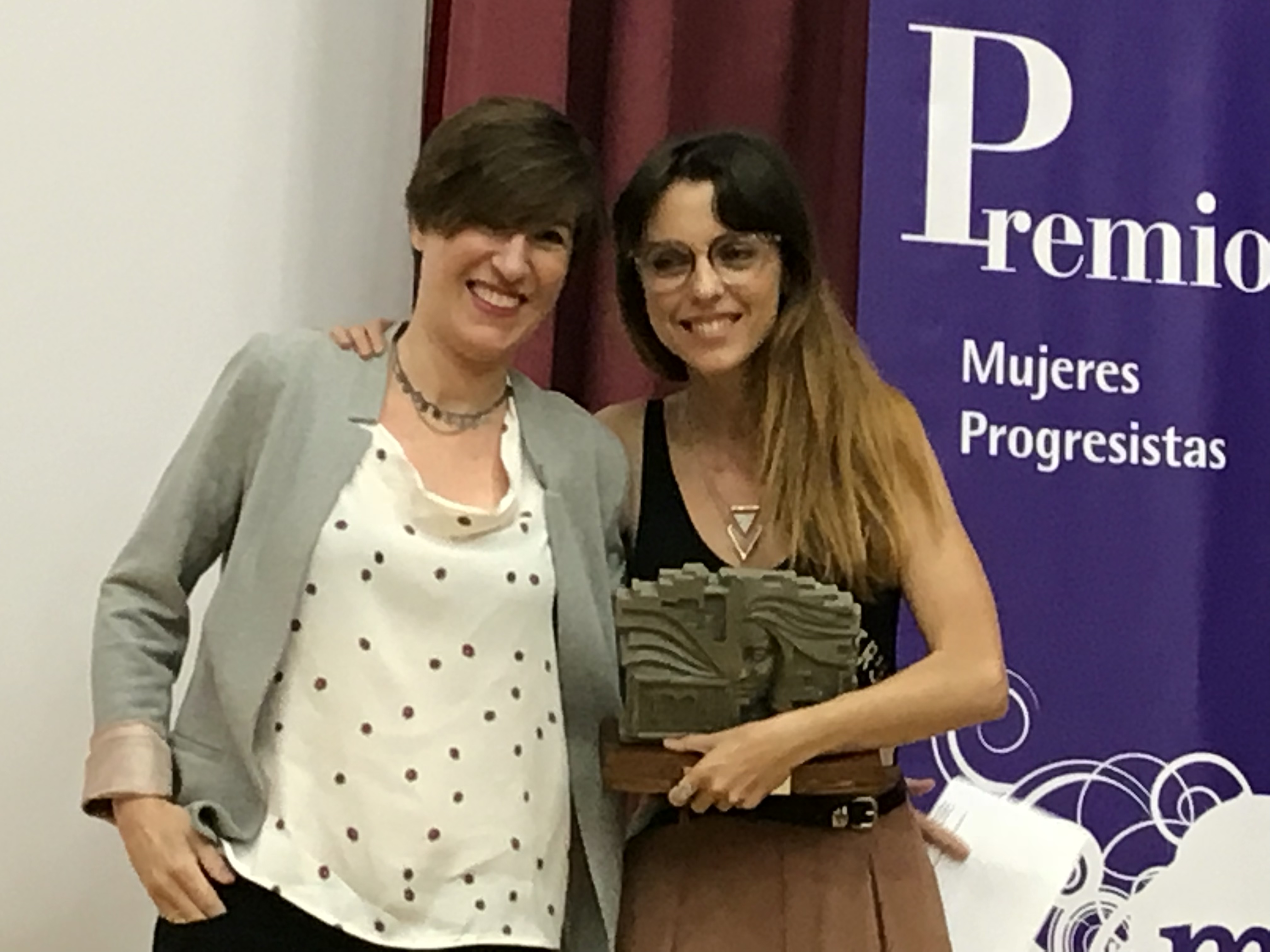 Yagüe entrega a Leticia Dolera el Premio Mujeres Progresistas ortorgado por las Federación de Mujeres Progresistas